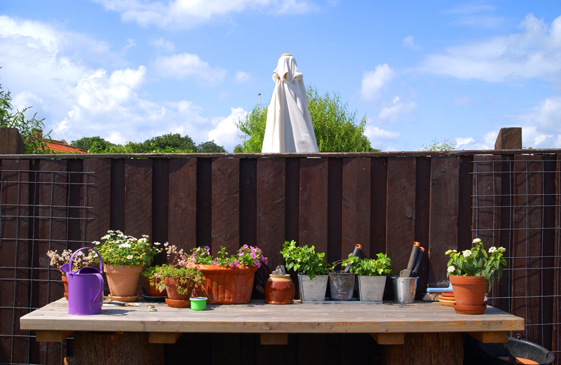 Havebord med potteplanter.